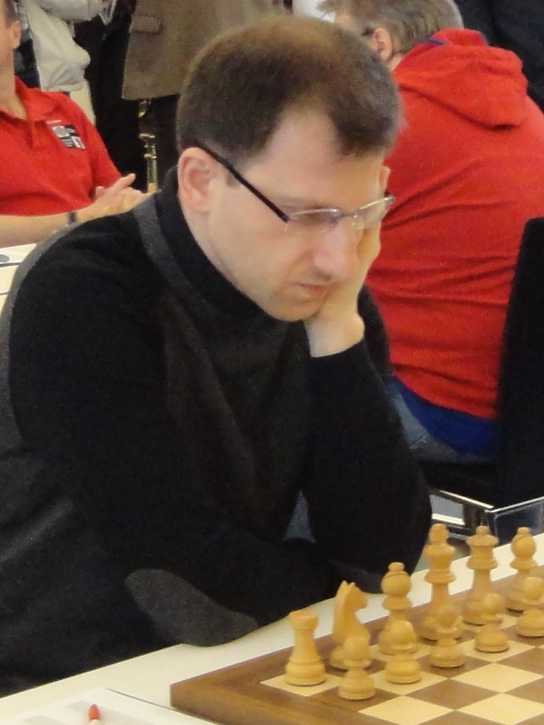 Tigran Gharamian, Deutsche Schachbundesliga Saison 2015/16, Runde 12 in Baden-Baden.